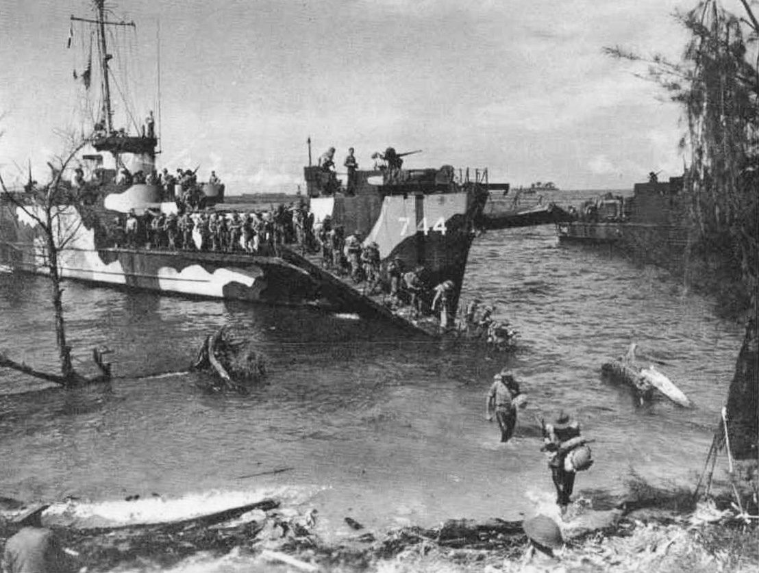 La 24e brigade australienne débarque depuis le LCI 744 à Labuan, le 10 juin 1945.